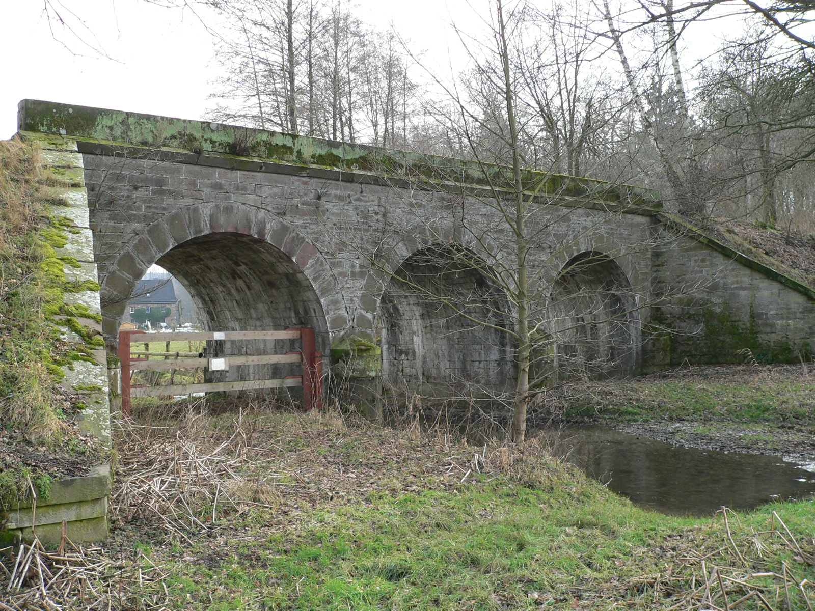 Viadukt bei Wülmersen (km 9,0)der ehemaligen Carlsbahn über die Holzape Fotograf: selbst fotografiert Datum: 12.02.2006